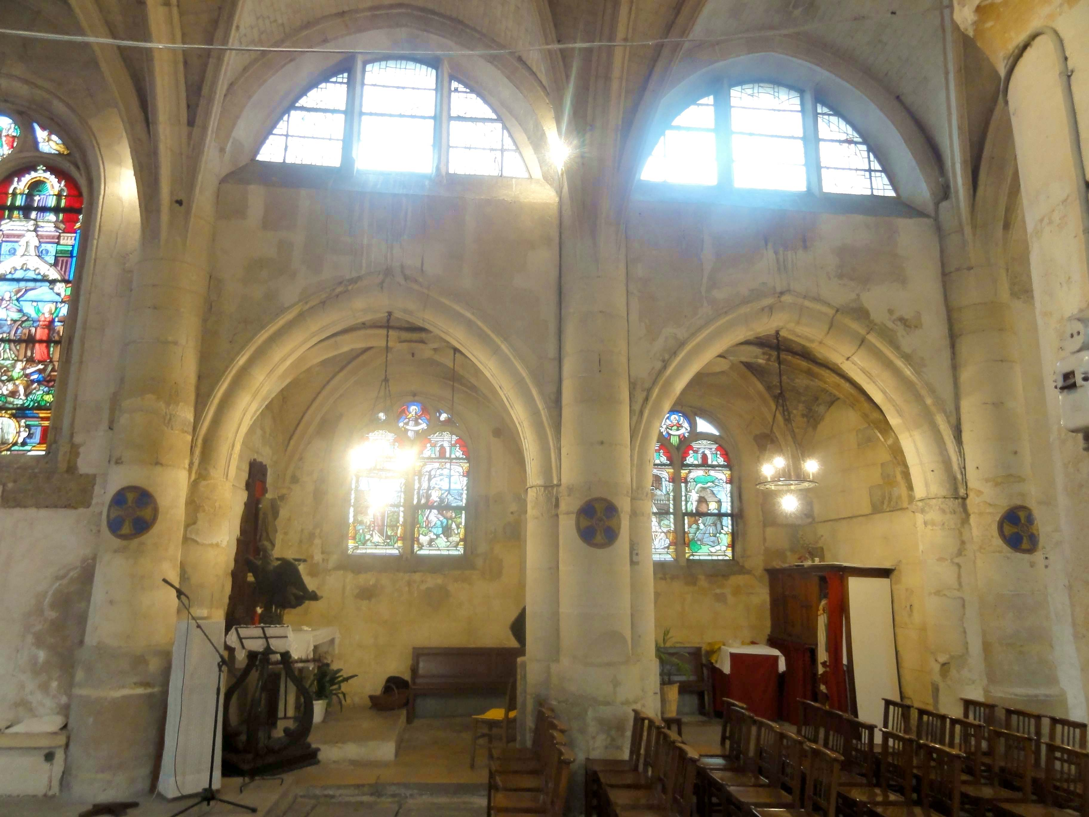 Nef, 5e et 4e travée, élévation sud.